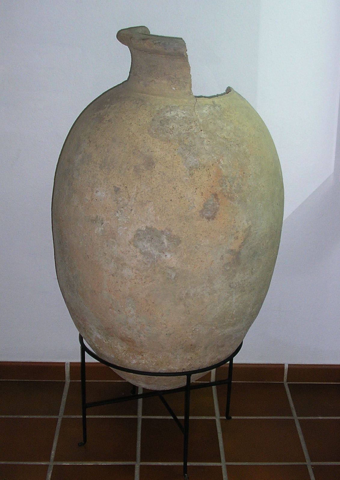 Tinaja árabe depositada en el museo municipal de Algeciras